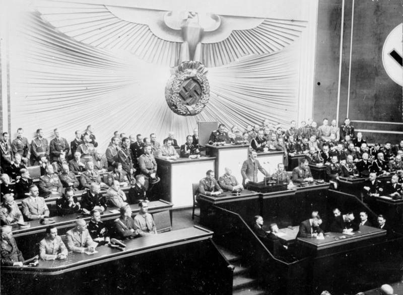 Die historische Reichstagssitzung am 1. September 1939 Der Führer spricht. 1.9.39 Fot. Wag